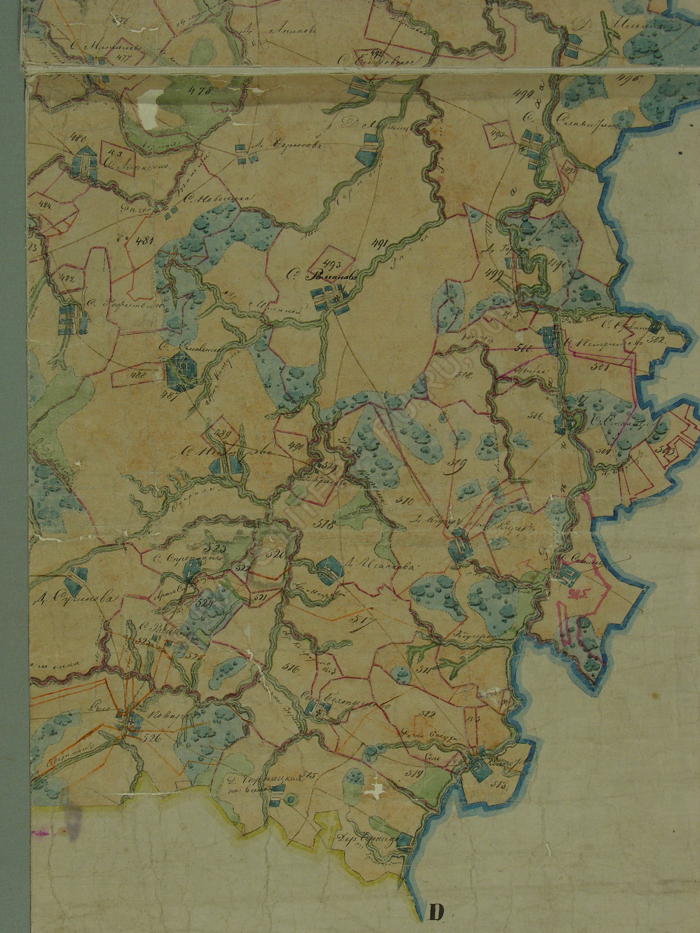 Карта Переславского уезда (ПГМ 1 версты) 1780—1790 гг